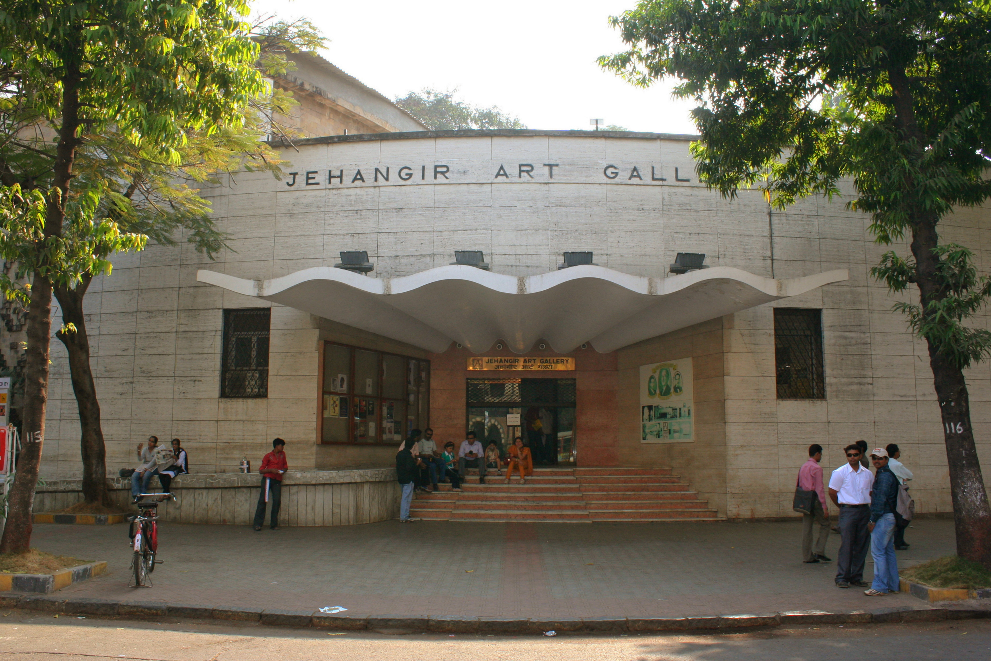 jahangir art gallery